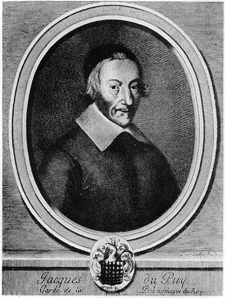 Jacques du Puy (1586 - 1656) - Bibliothèque du Roi (Vorläufer der Bibliothèque Nationale), Paris, Frankreich